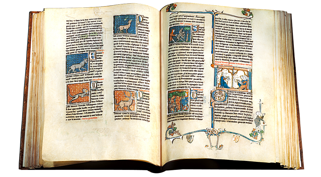 libro abierto